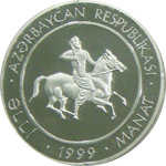 1999-cu ildə “Kitabi-Dədə Qorqud” dastanının 1300 illiyinə həsr olunmuş 50 Manat dəyərində gümüş xatirə sikkələri buraxılmışdır.